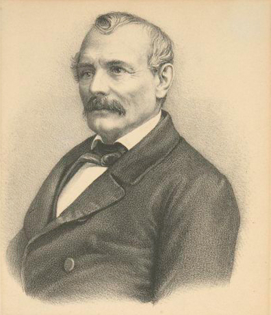 Zeitgenössische Abbildung des Komponisten Carl Gollmick (1796 - 1866)